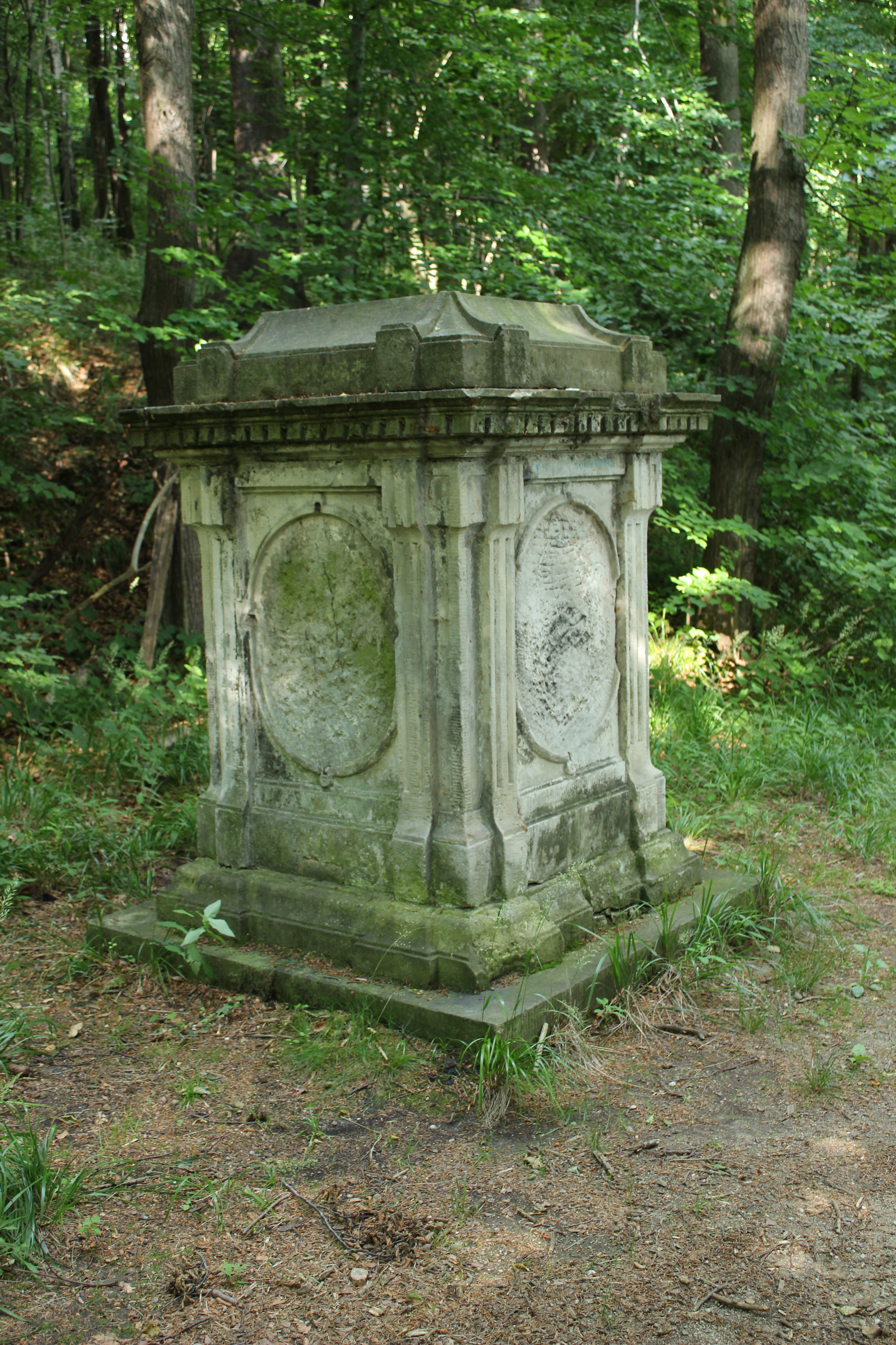 Podstavec pomníku v lázeňském parku v Lázních Libverdě.